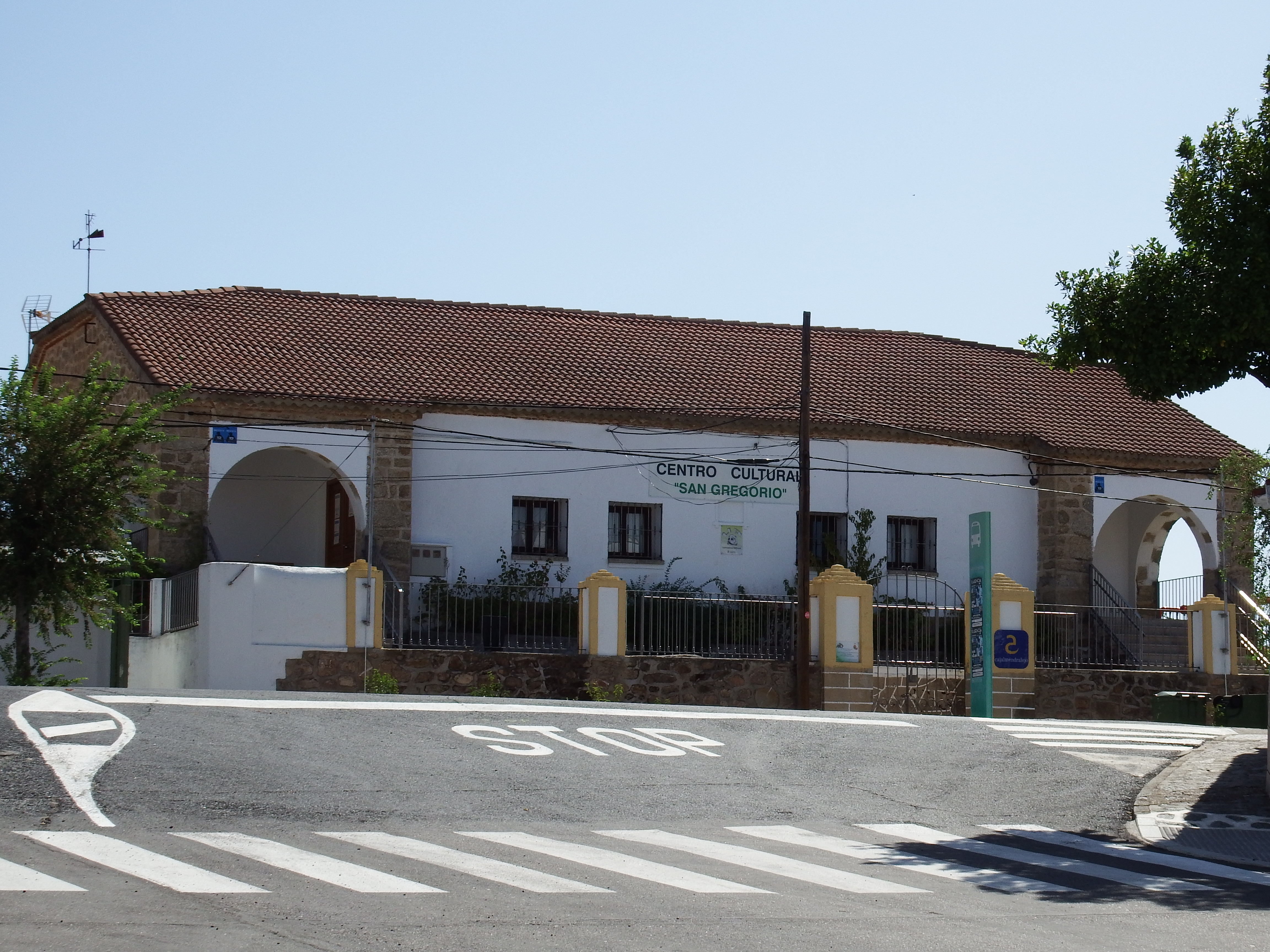 Piedras Albas, Cáceres